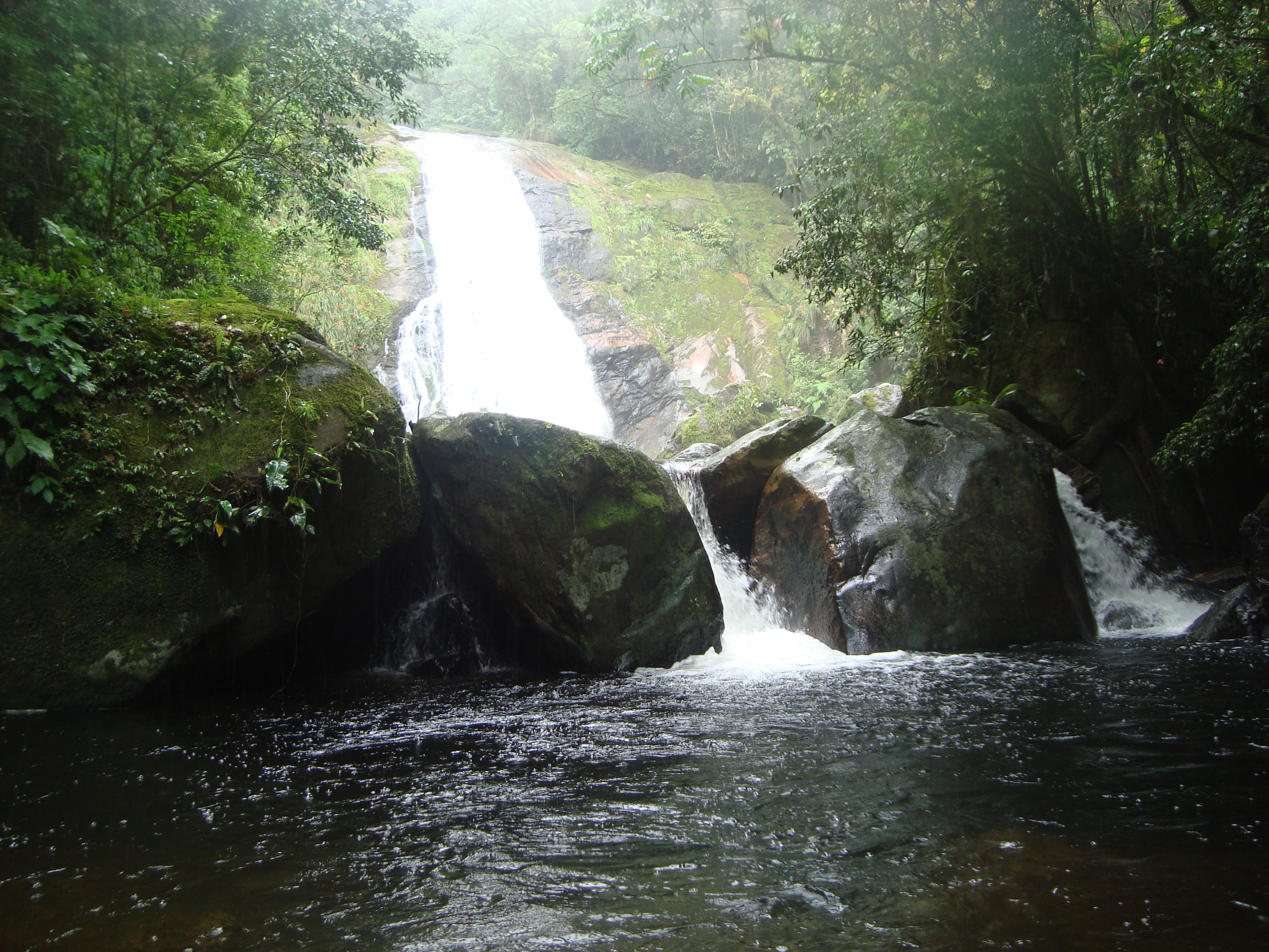 Maravilhosa queda d'água no Parque Estadual Do Pau Oco, Morretes.